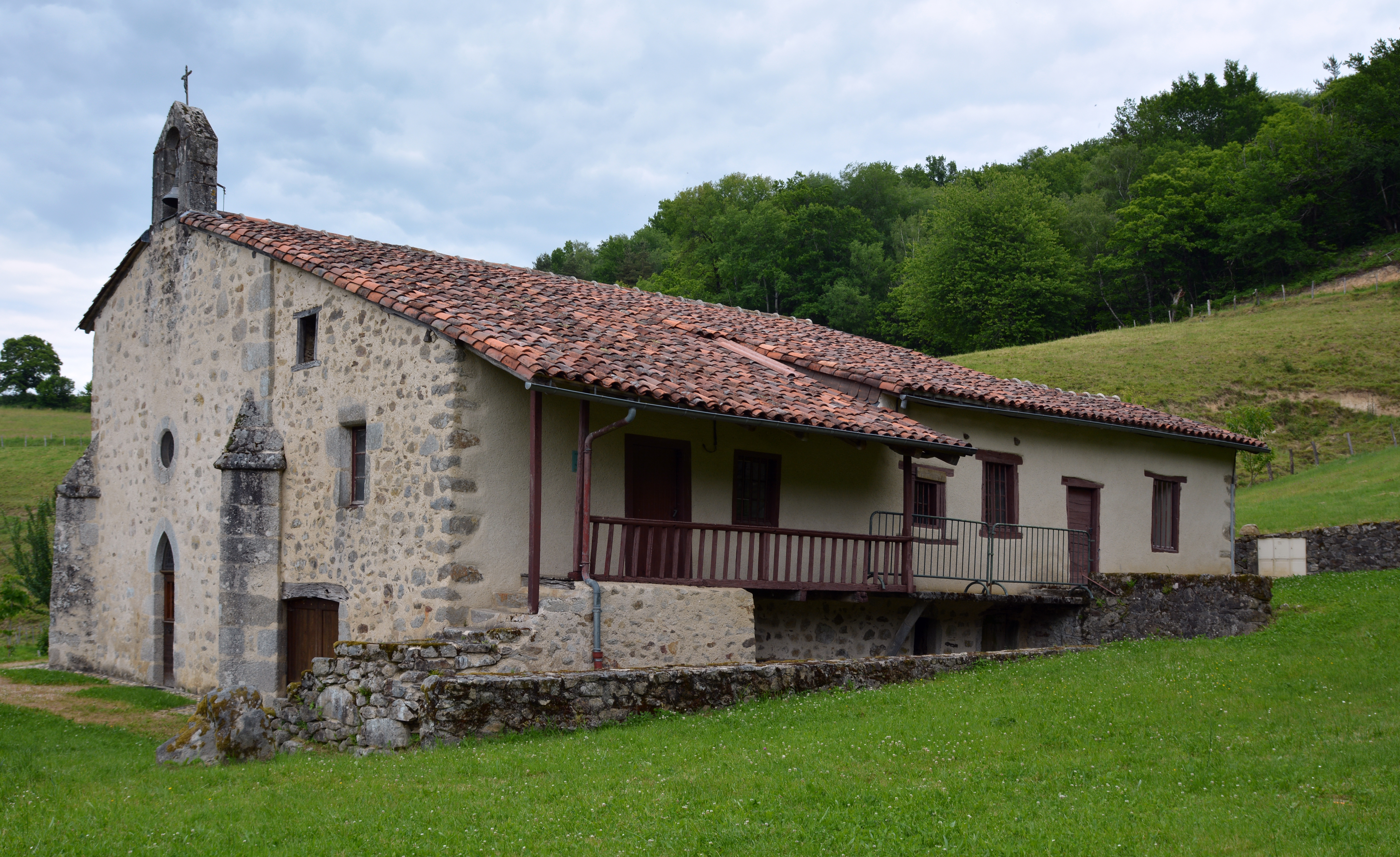 Prieuré de Notre-Dame-du-Pont à Leynhac, Cantal, Auvergne, France